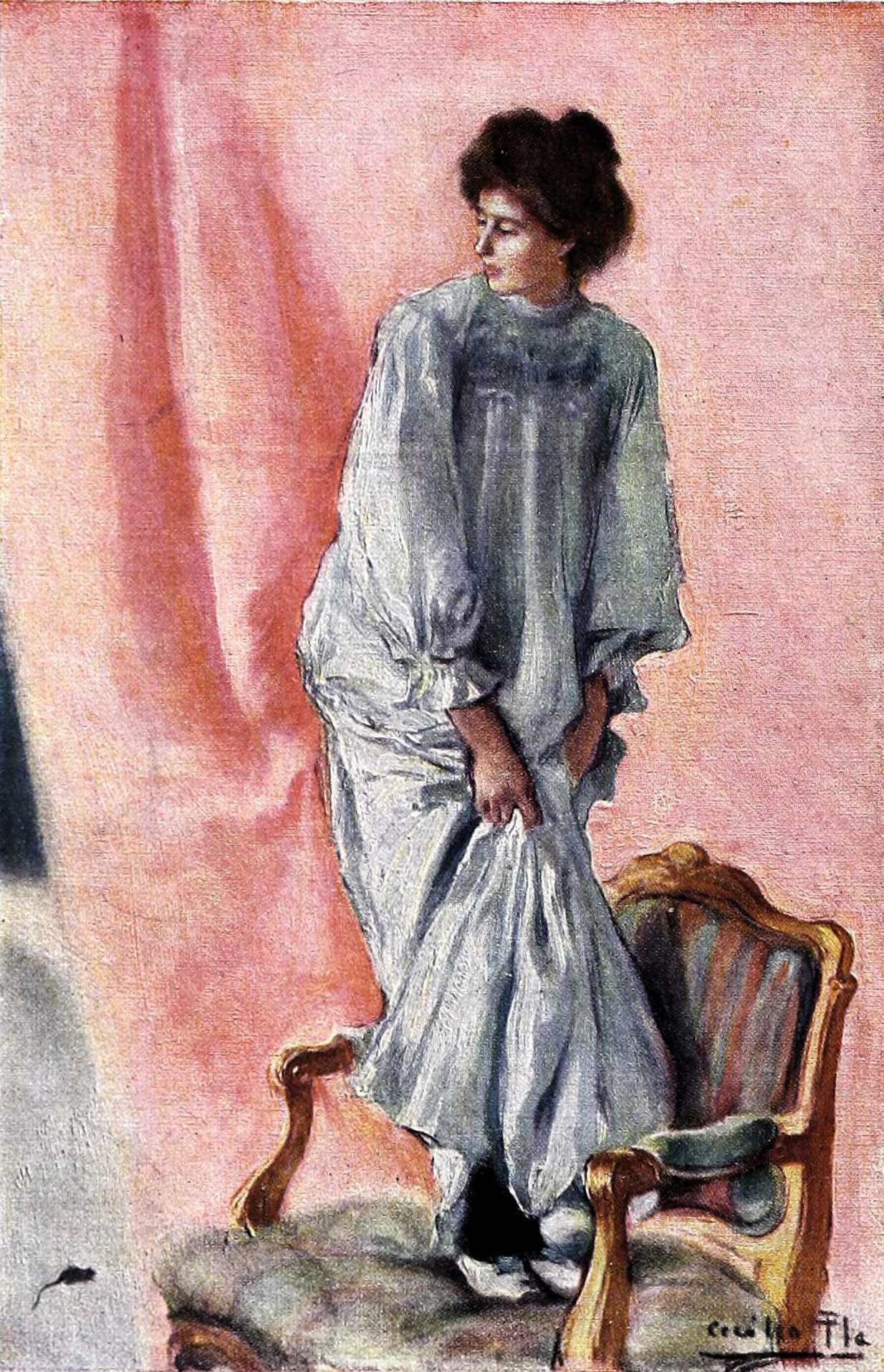 Terrores femeniles.